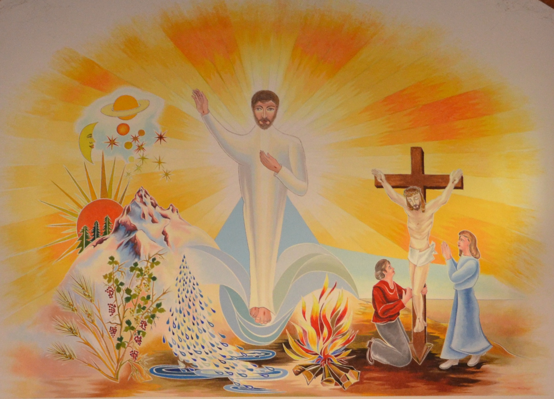 Fresque de l'église du Christ-Roi de Fey, peinte par Francis Michelet